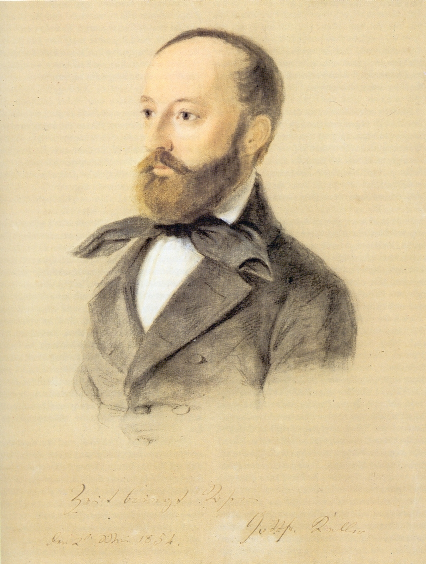 Gottfried Keller, pastel on paper, 29 x 23,5 cm, 1854 in Berlin, unsigned, inscription: "Zeit bringt Rosen/Gottfr. Keller den 2t. Mai 1854".